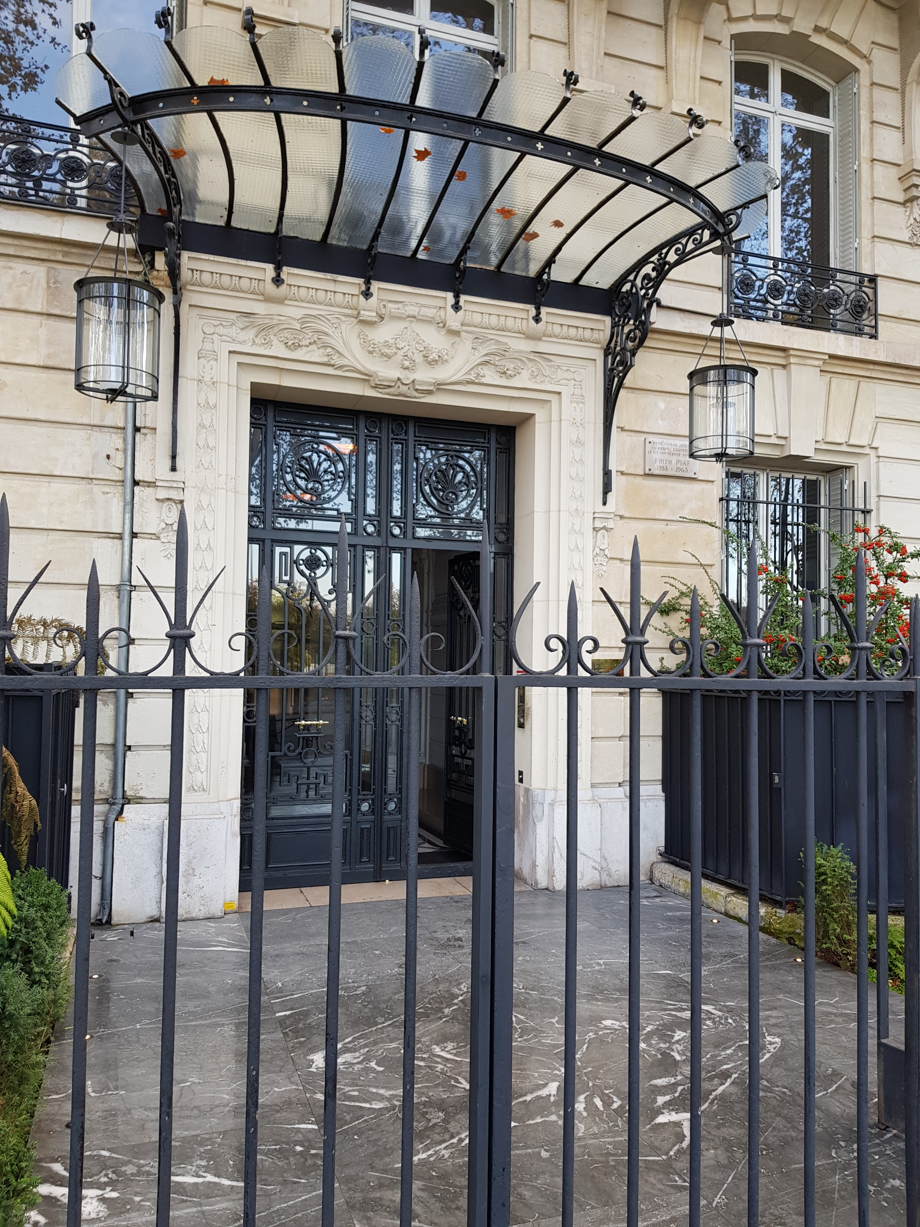 Dernier domicile de la chanteuse Edith Piaf : 67, boulevard Lannes, Paris 16e.